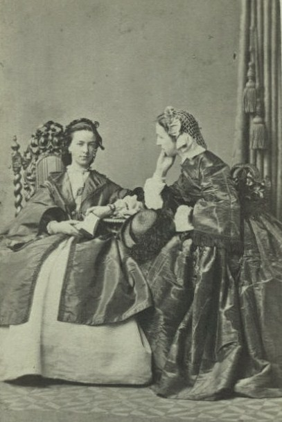 Надежда Ивановна фон Радовиц, ур. Озерова (1840—1912) и Мария Ивановна Петерсон, ур. Озерова (1836—1906)